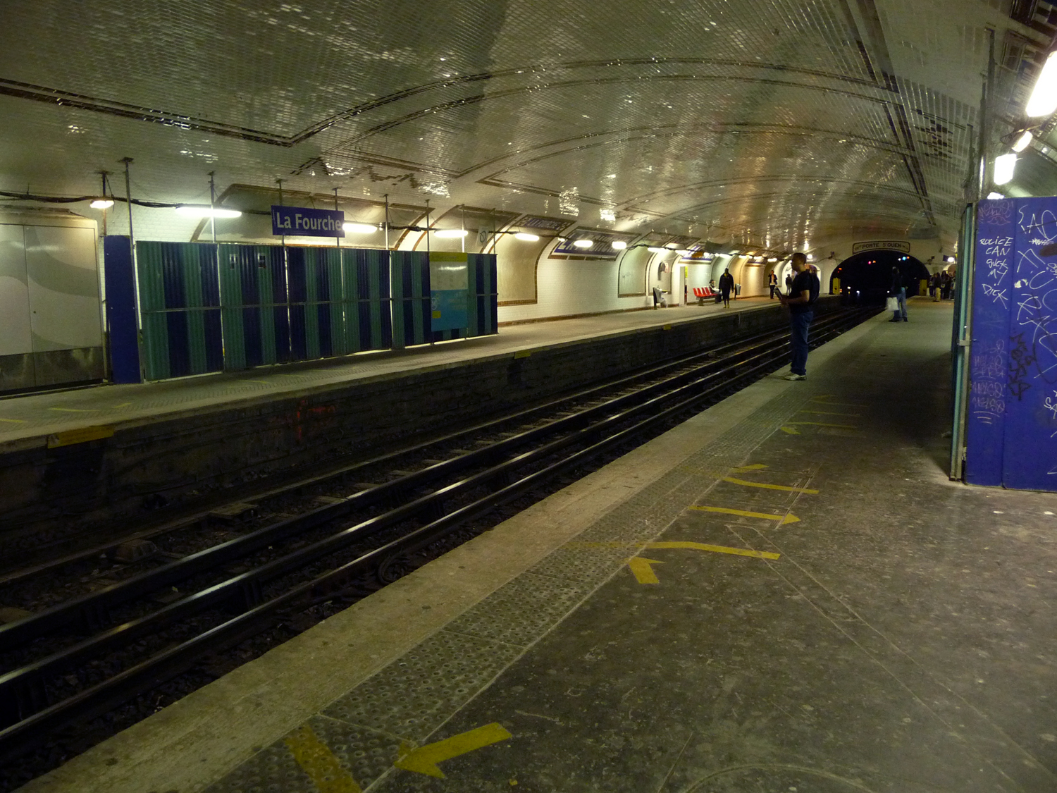 La Fourche pendant les travaux